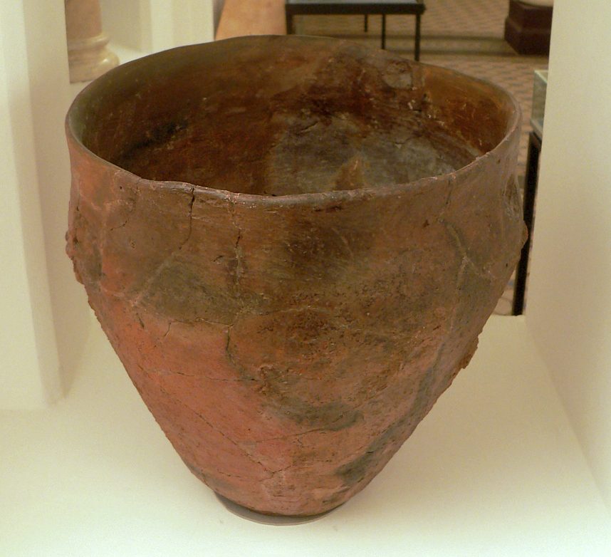 Ausstellung mit Fundstück Rautopf aus Wilkenburg, gefunden von Wolfgang Bauer, ausgestellt im Niedersächsischen Landesamt für Denkmalpflege